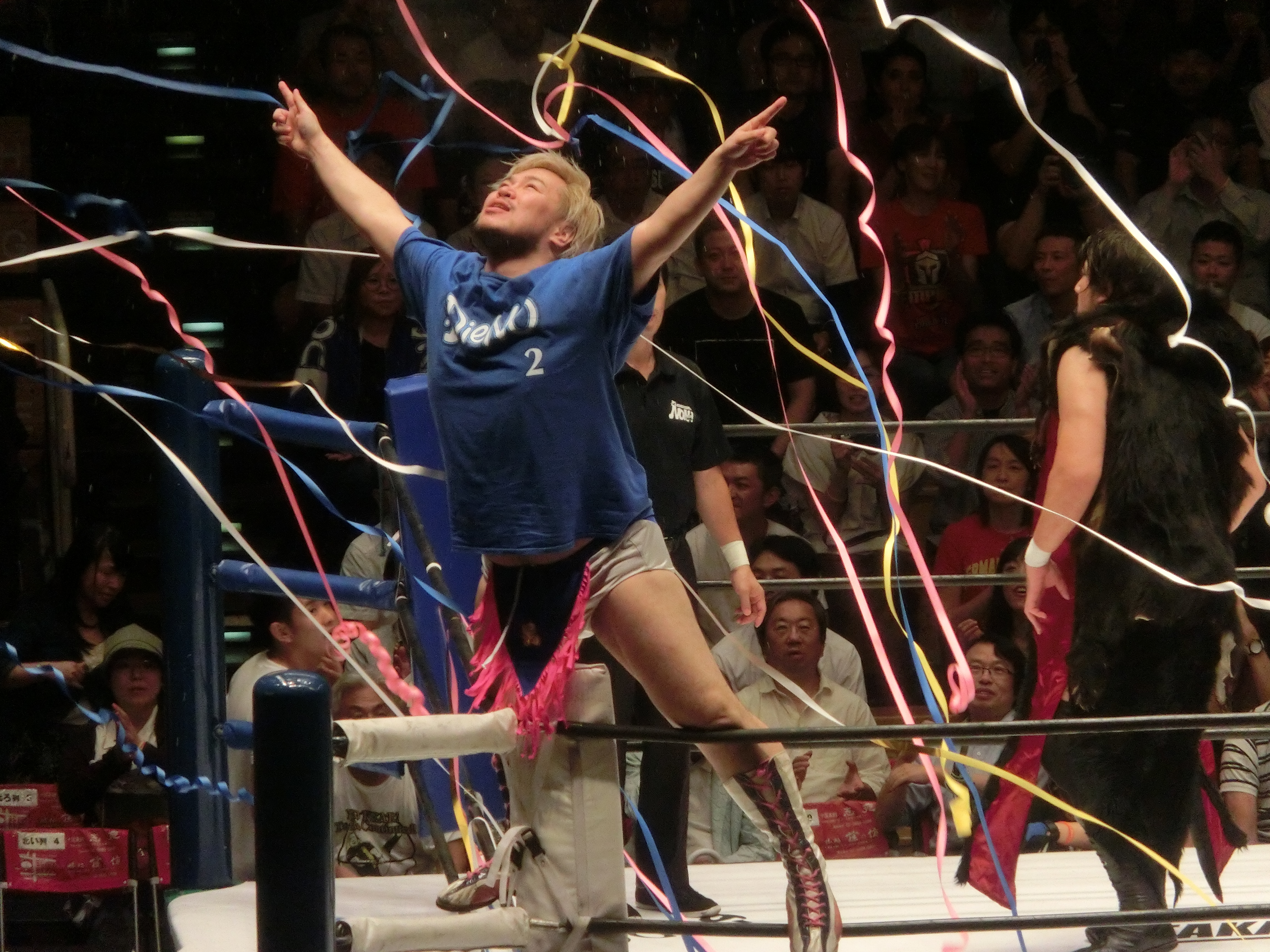 2018年8月31日、後楽園ホール